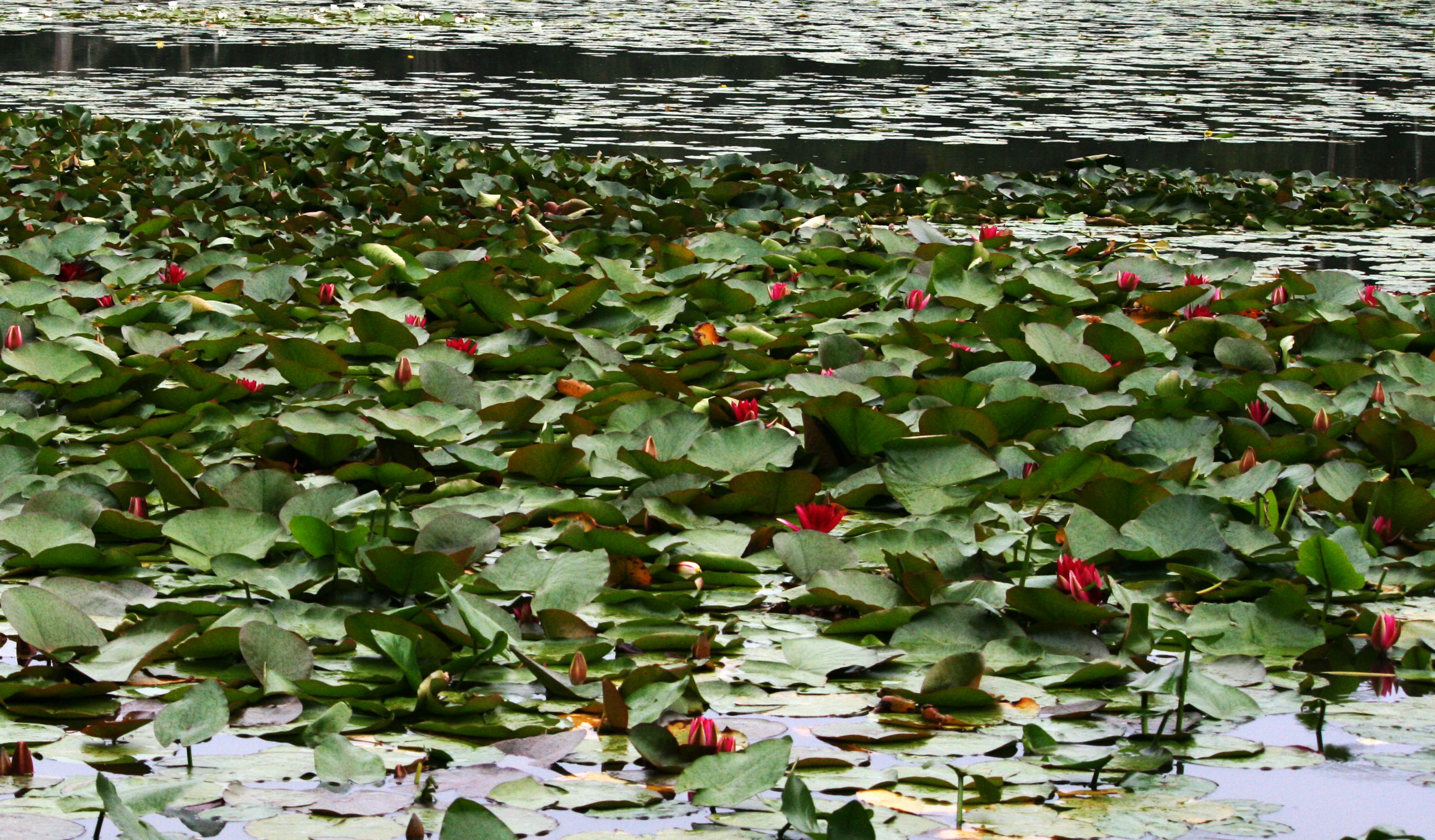 Röda nöckrosor i Färsksjön, Eriksberg, Blekinge